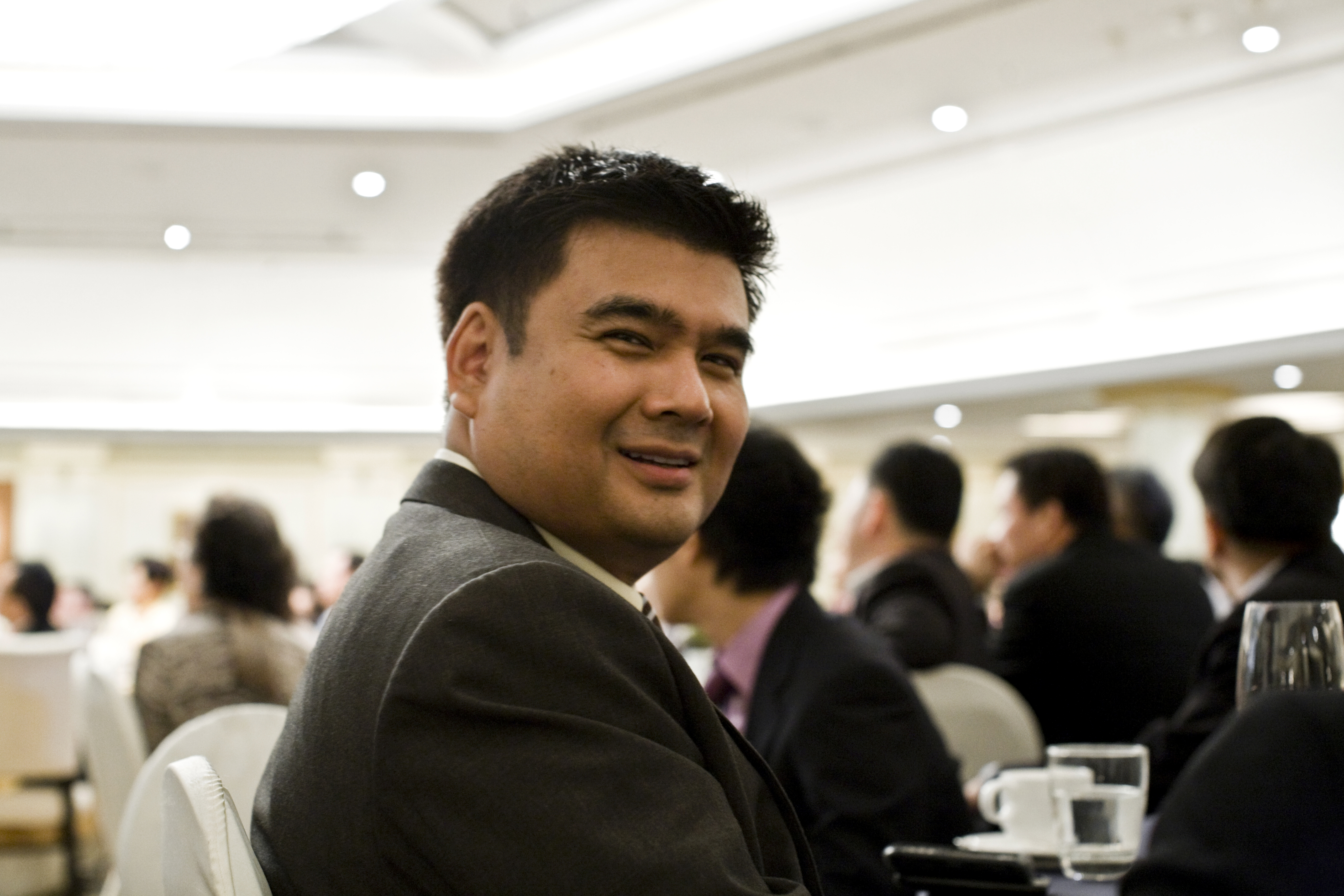 นายกรัฐมนตรี บรรยายพิเศษในหัวข้อ Towards the ASEAN Community ในงานเฉลิมฉลองการสถาปนามหาวิทยาลัย Bristol ครบ 100ปี และการก่อตั้งสมาคมนักเรียนเก่าอังกฤษฯ ครบ 75 ปี ณ ห้องดุสิตธานีฮอลล์ โรงแรมดุสิตธานี 14ธันวาคม2552 (The Official Site of The Prime Minister of Thailand Photo by พีรพัฒน์ วิมลรังครัตน์)